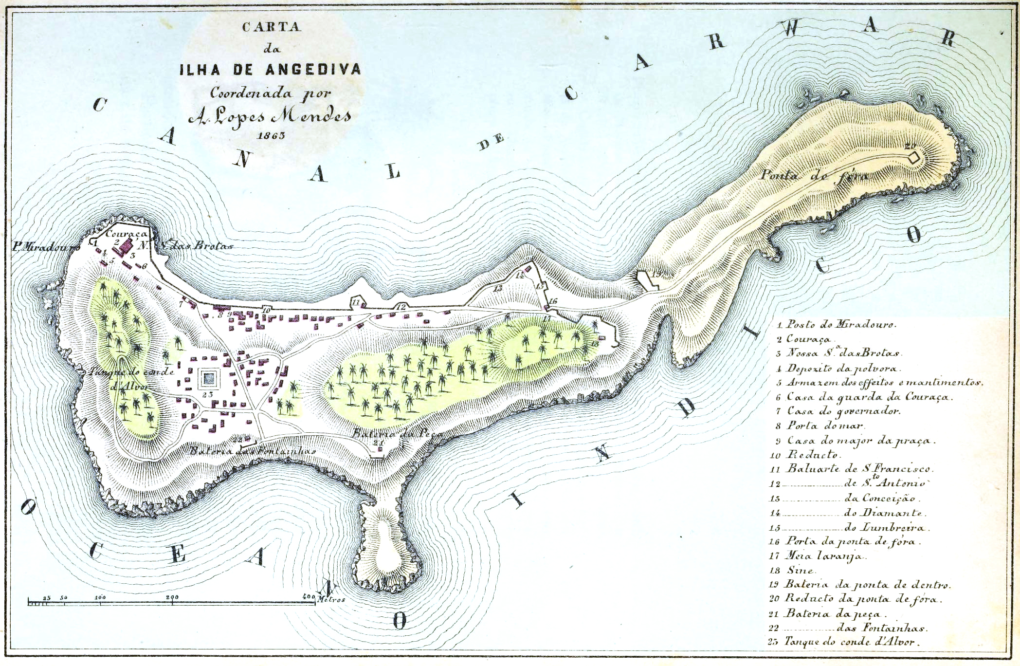 Anjediva Island